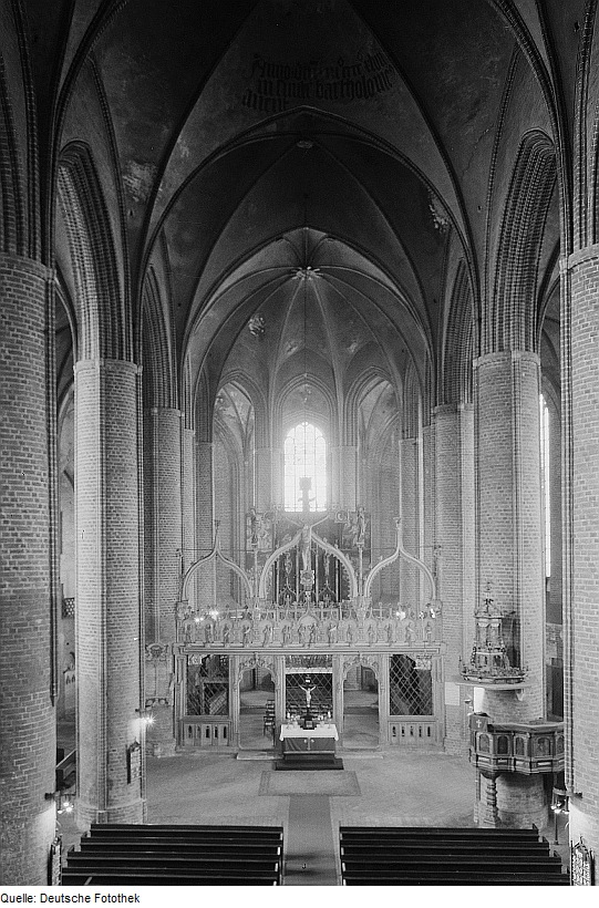 Original image description from the Deutsche Fotothek Stendal. St. Marien, Inneres, Blick zum Chor